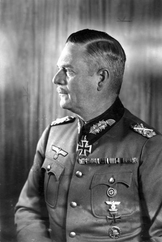 Wilhelm Keitel Generalfeldmarschall Wilhelm Keitel (Porträt) Abgebildete Personen: Keitel, Wilhelm: Generalfeldmarschall, Ritterkreuz (RK), Heer, Deutschland (GND 118721577)